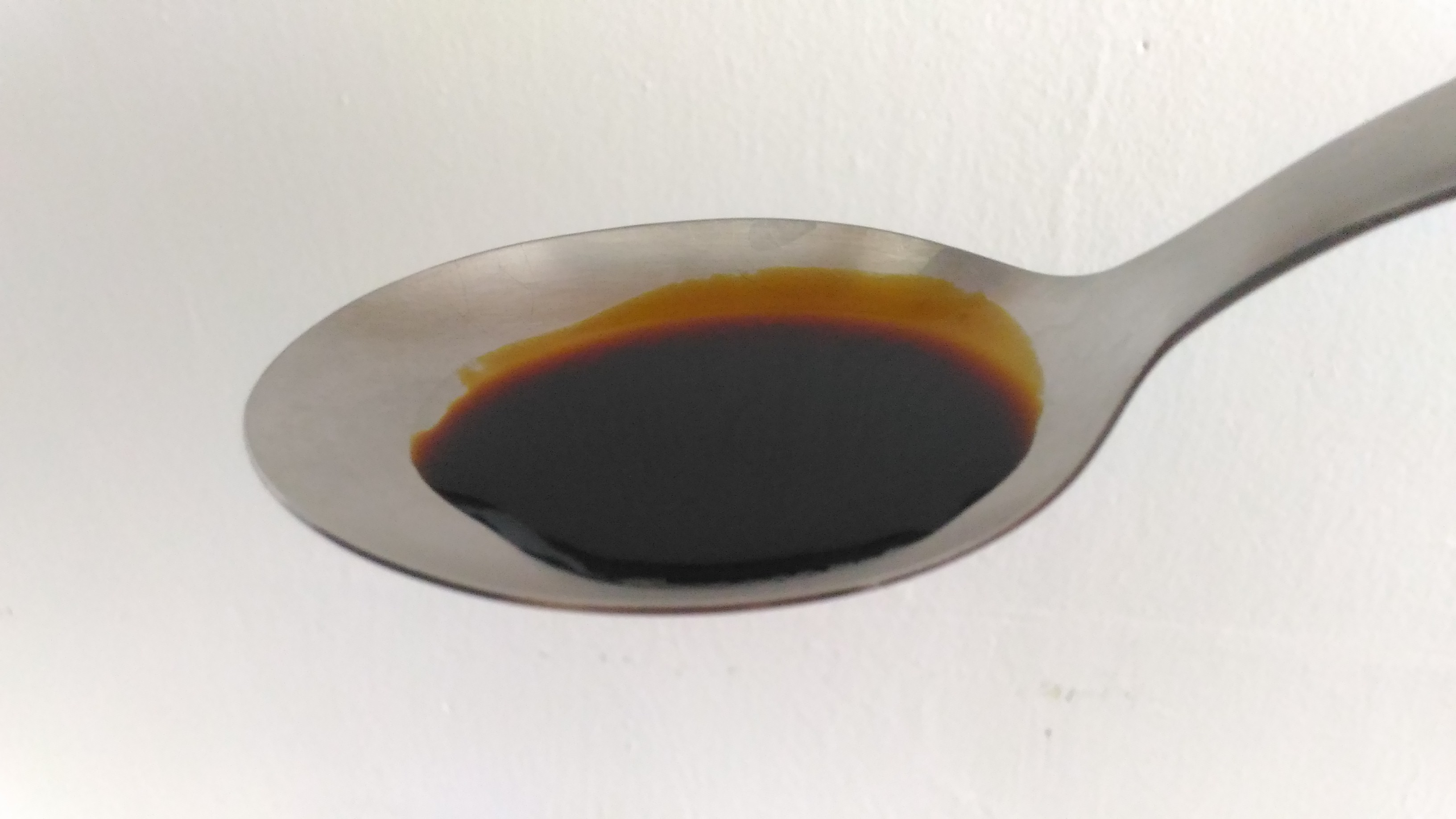 Cuillère avec du sirop de caroube